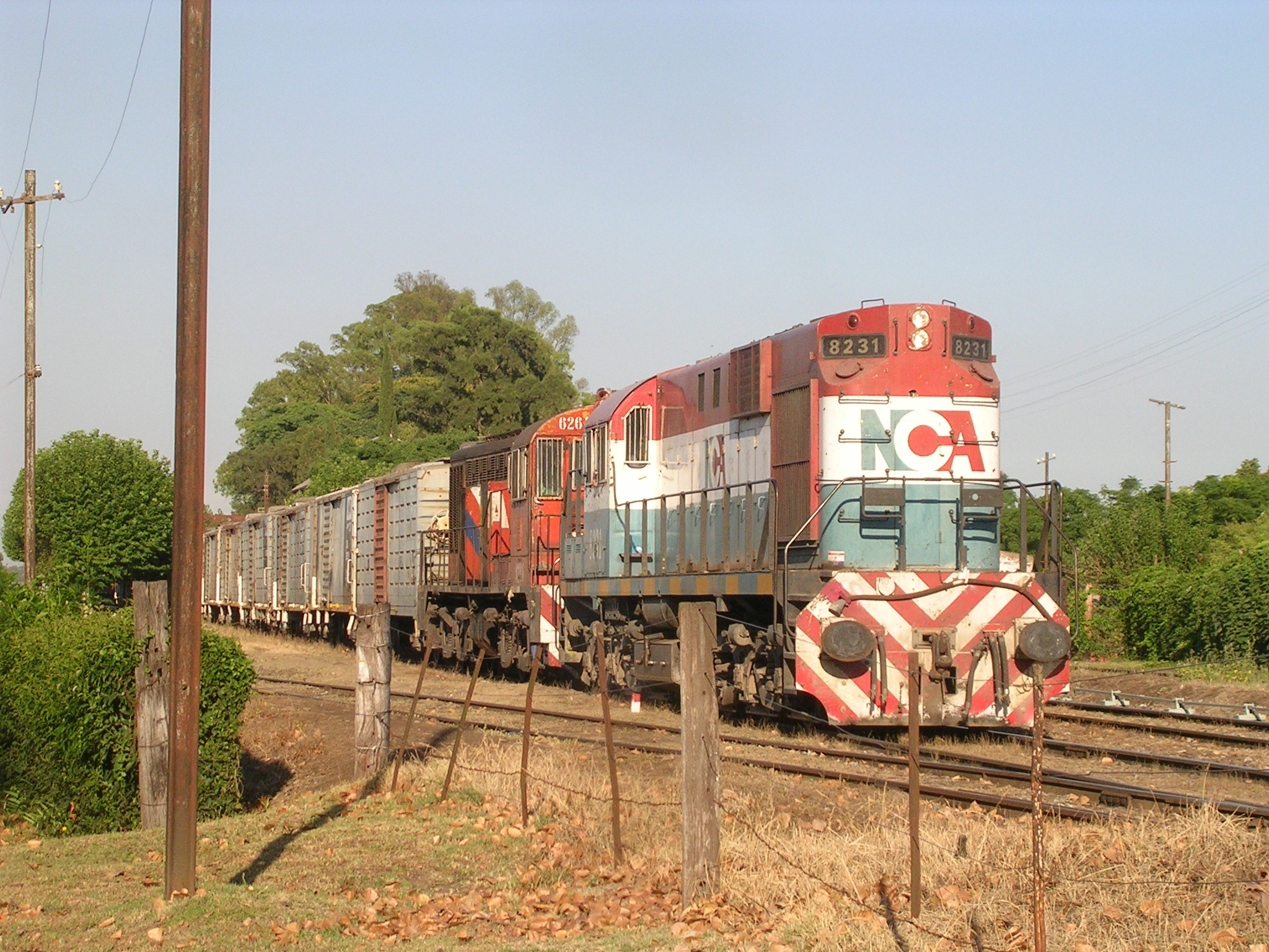 Locomotora Alco RSD-16 de NCA en su paso por Baradero. Ramal Ferrocarril Mitre.